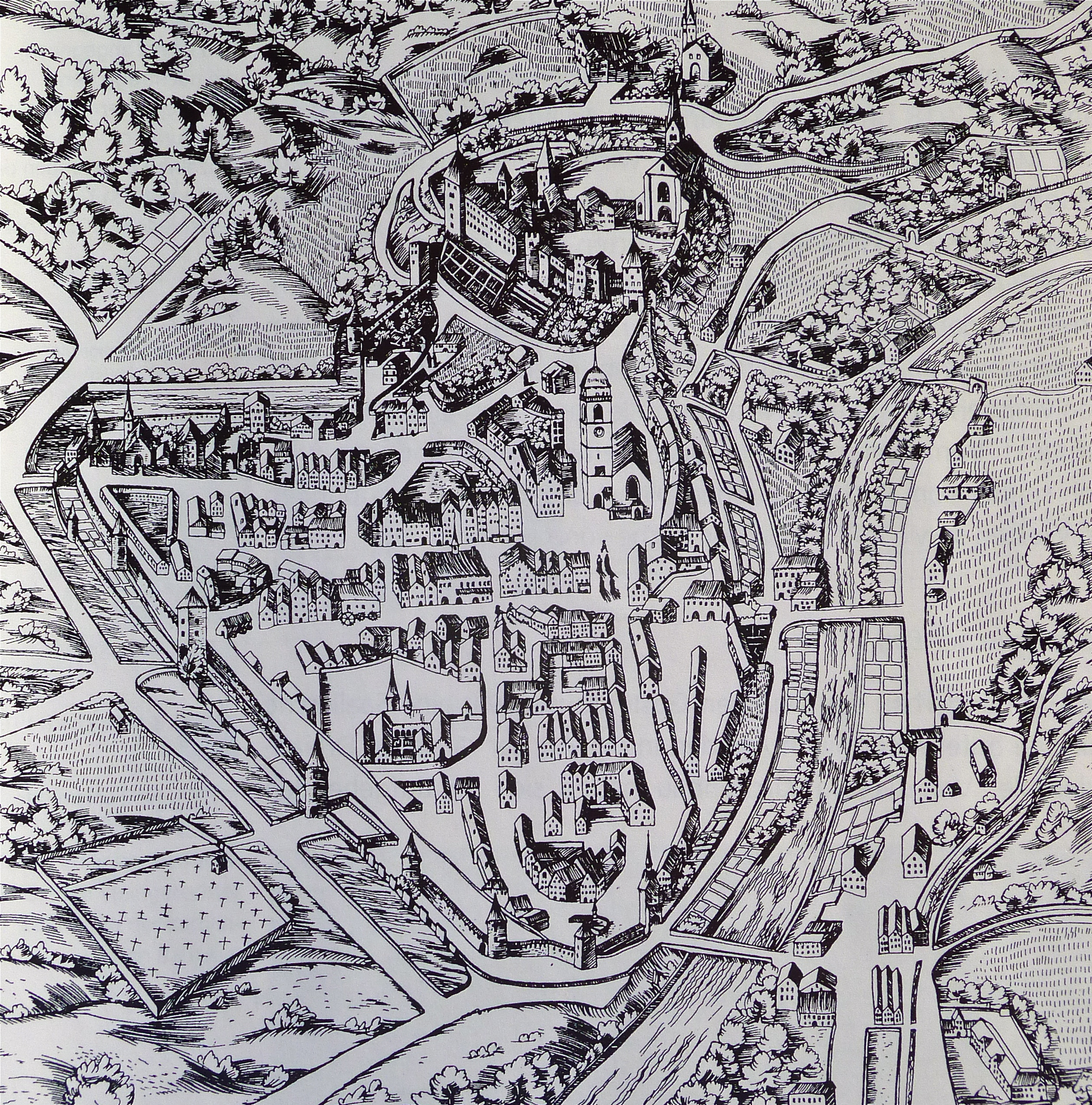 Chur um 1640, nach einer Umzeichnung von Martin Risch